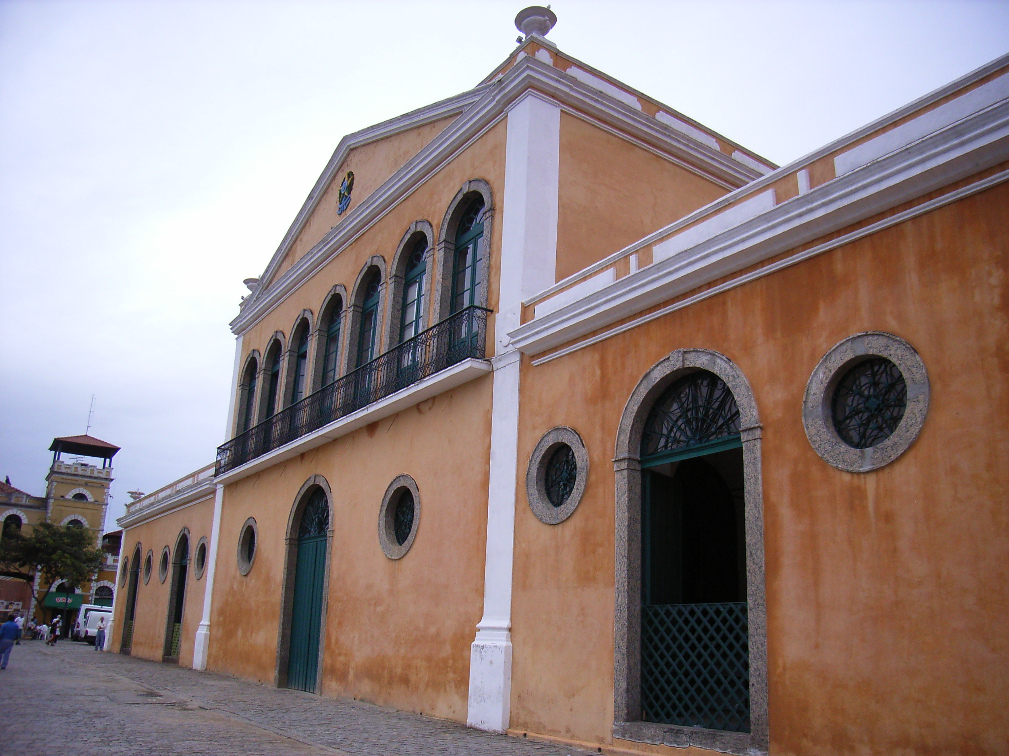 Edifício da alfândega de Florianópolis, Brasil.rimg0065.jpg